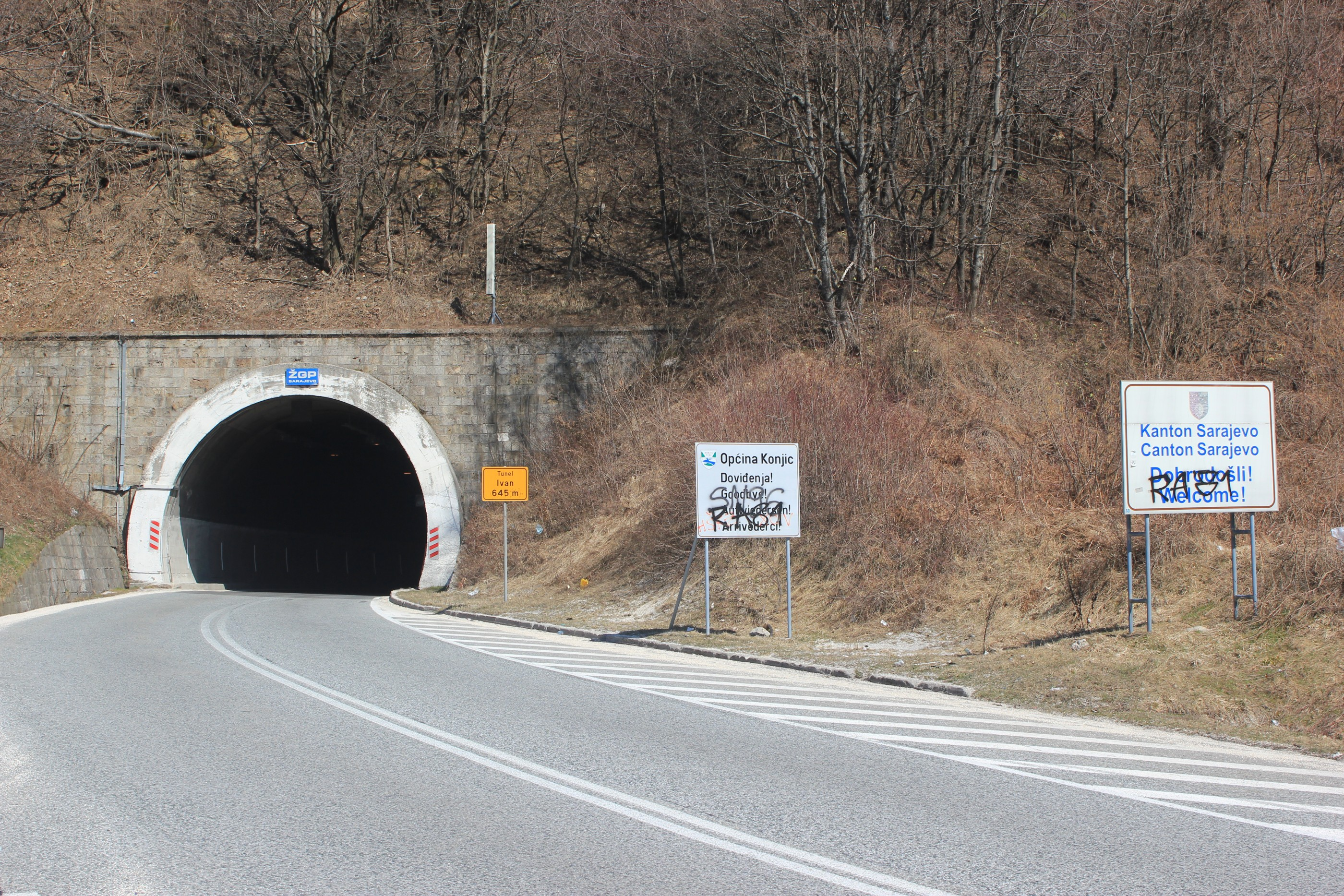 Südportal des Tunnels Ivan Sedlo zwischen Sarajevo und Konjic.Hornjoserbsce: Južny portal tunla Ivan Sedlo mjez Sarajewom a Konjicom.